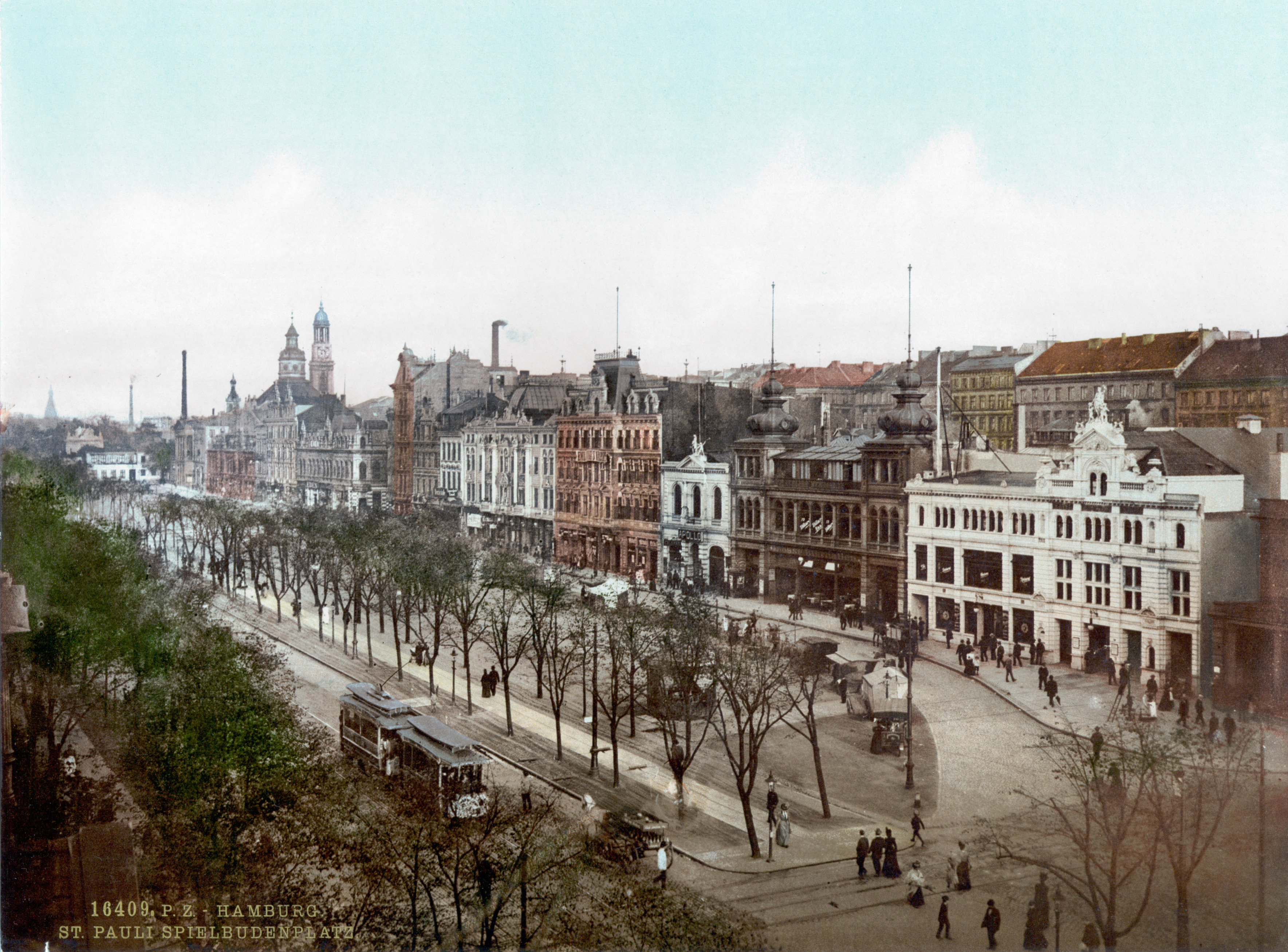 von Beschreibung: Hamburg St. Pauli, Spielbudenplatz.